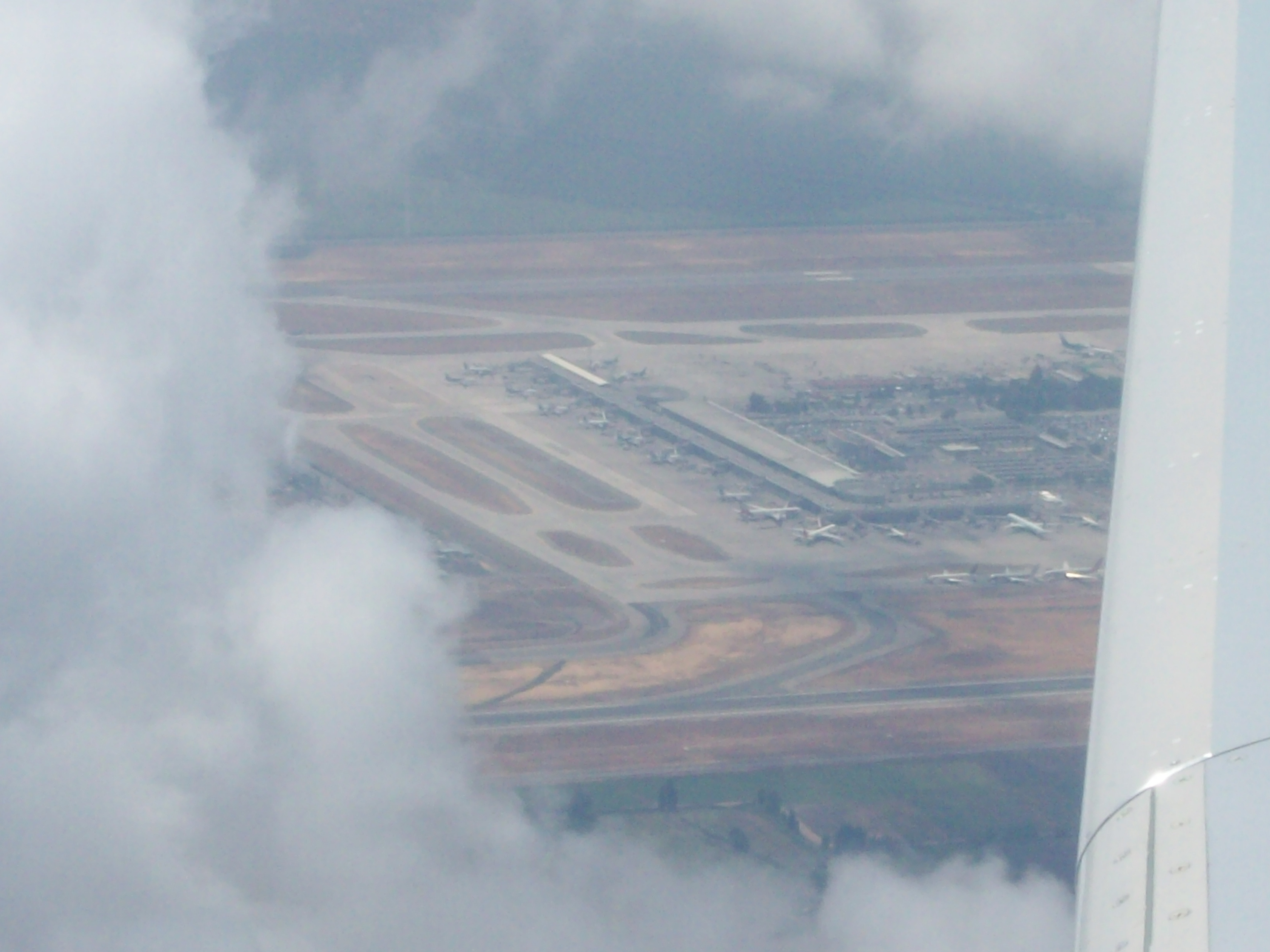 Aeropuerto Comodoro Arturo Merino Benitez (SCL-SCEL) Santiago de Chile- Noviembre 2014